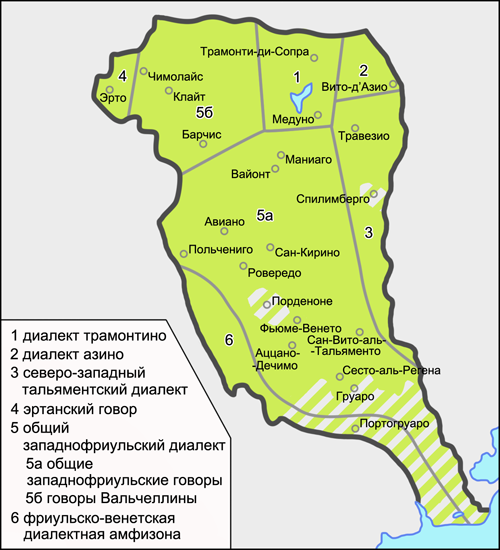 Карта диалектов и говоров западнофриульской диалектной группы фриульского языка. Источники: Roseano P. Suddivisione dialettale del friulano // S. Heinemann, L. Melchior (eds.). Manuale di linguistica friulana. — Berlin: De Gruyter Mouton, 2015. — P. 162—163. — ISBN 978-3-11-031059-7. Treccani. Enciclopedia. Friulani, dialetti (2010). Нарумов Б. П., Сухачёв Н. Л. Фриульский язык // Языки мира. Романские языки. — М.: Academia, 2001. — С. 366—367. — ISBN 5-87444-016-Х